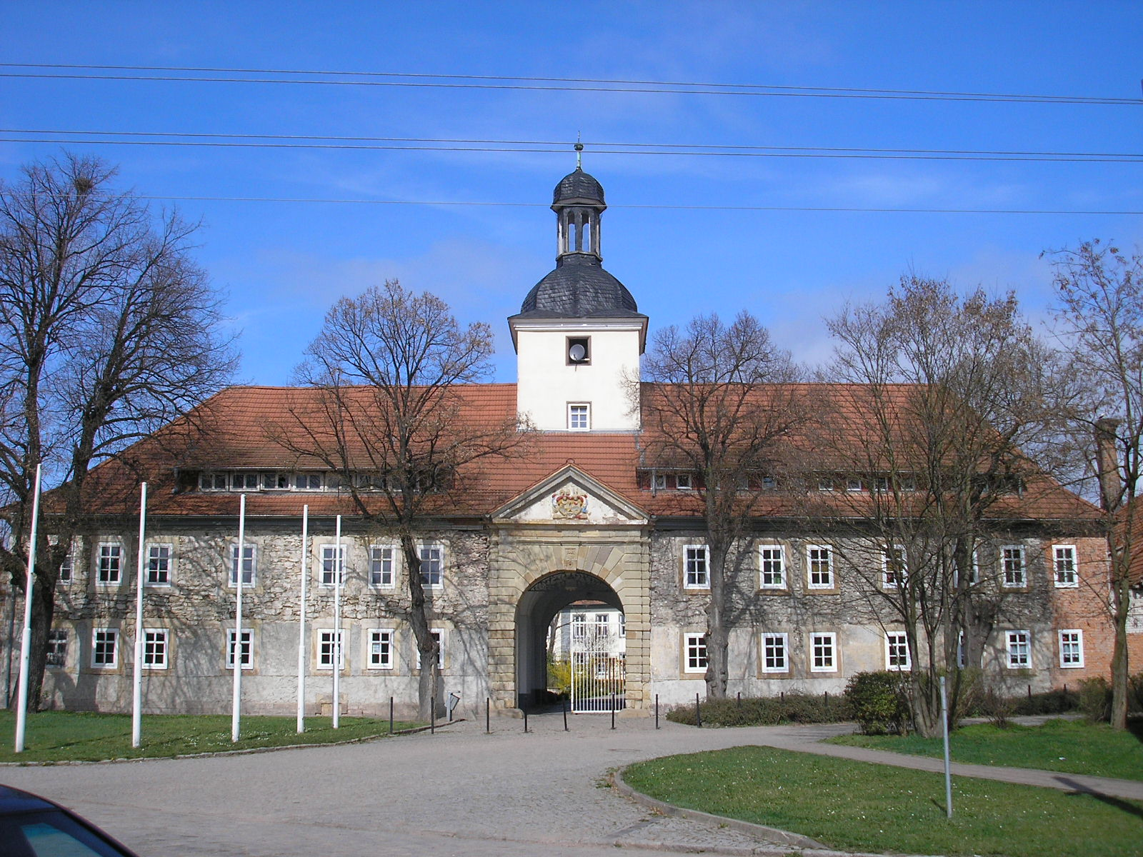 Das Eingangsgebäude der Schlossanlage in Gebesee (Thüringen).